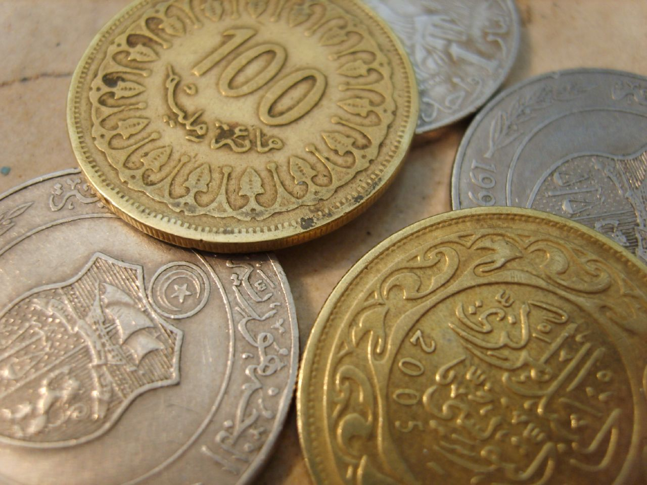 Diverses pièces de dinars tunisiens